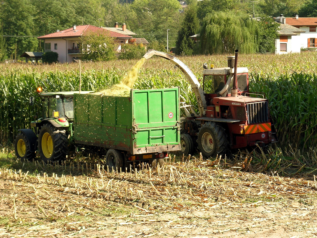 Raccolta mais in Valtellina, Castello dell'Acqua (Sondrio), Italia